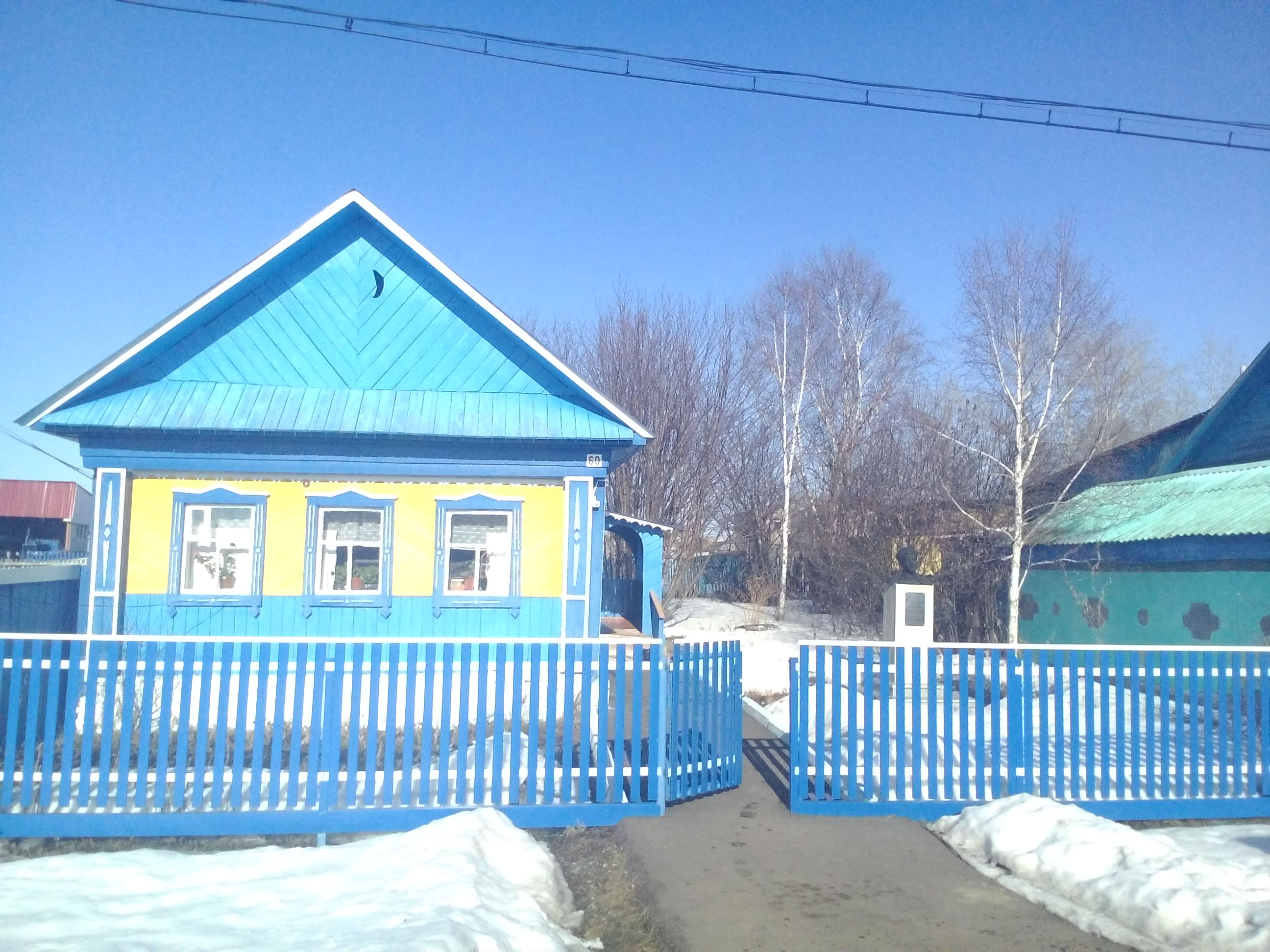 Музей Рамі Гаріпова